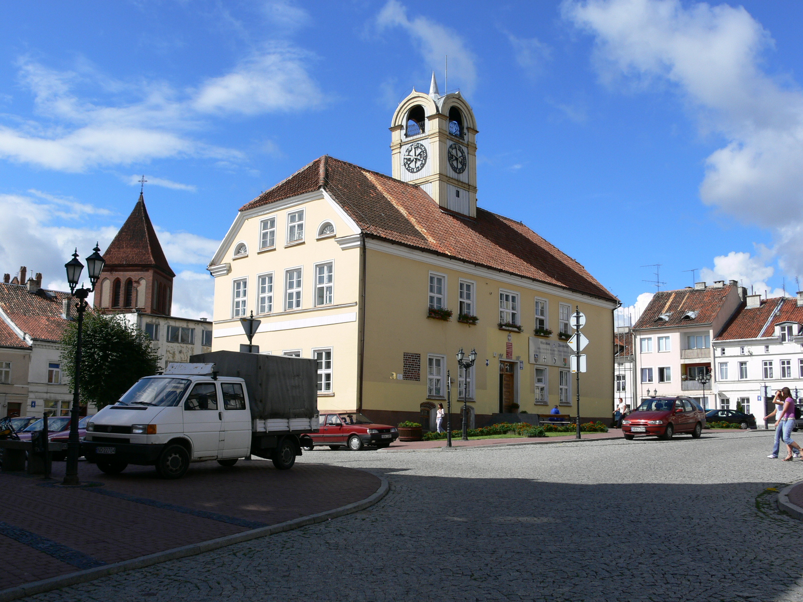 Górowo Iławeckie - górowski rynek z ratuszem w tle cerkiew Podwyższenia Krzyża Świętego